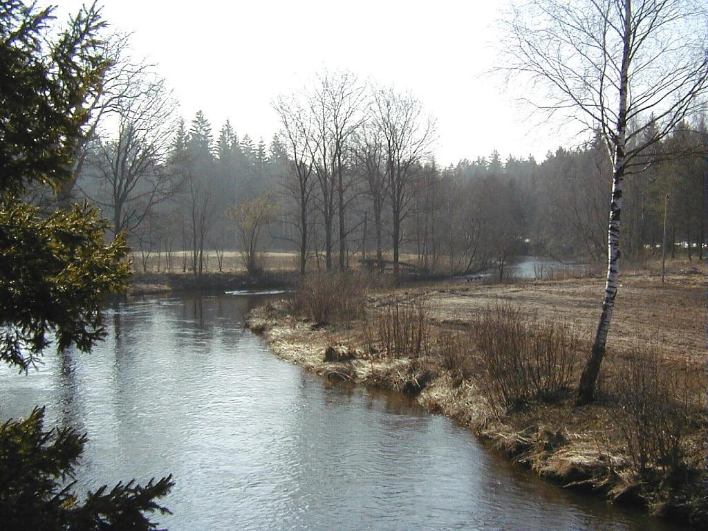 Arona pie Pļaviņu - Lubānas ceļa 2002-03-29